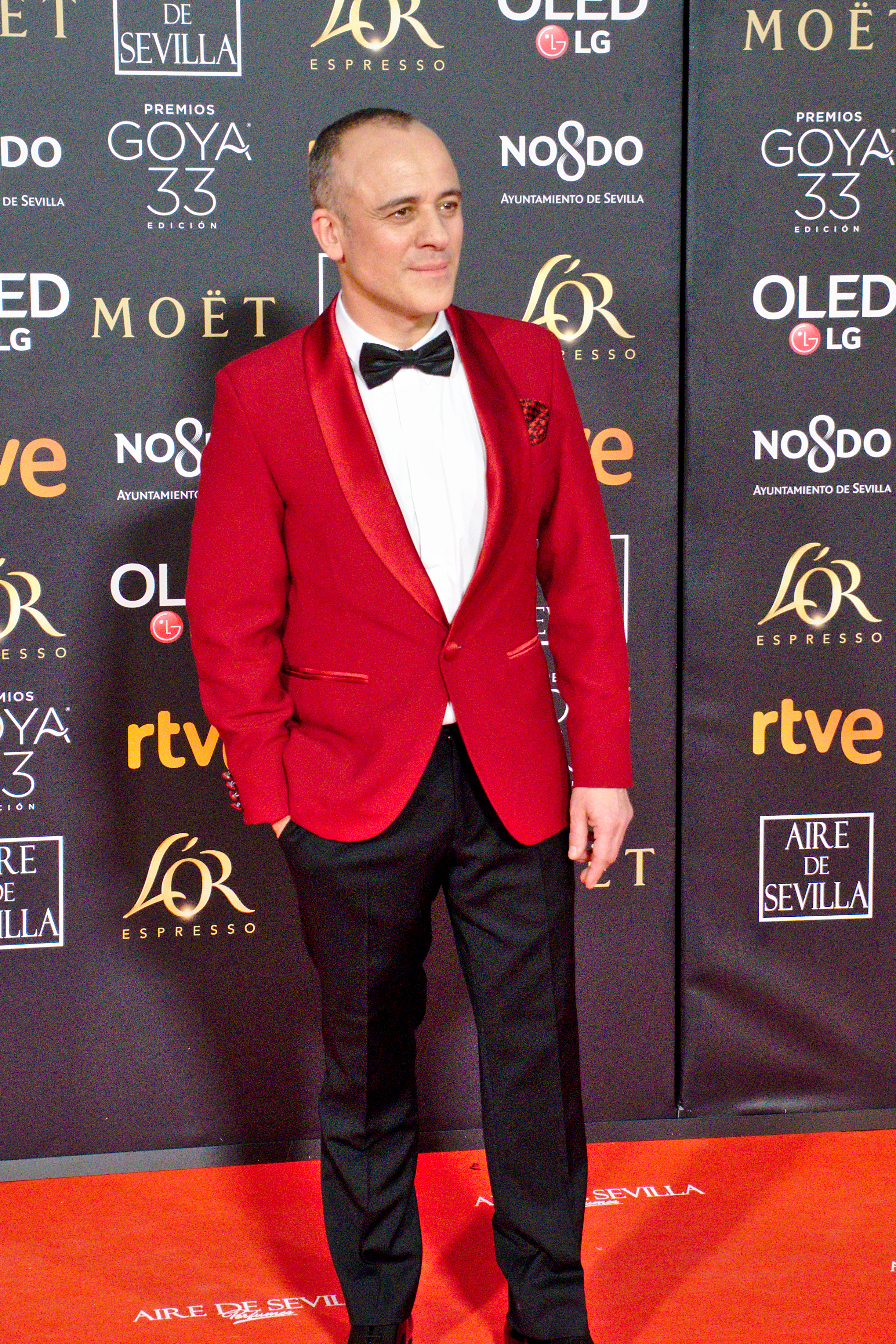 Javier Gutiérrez, en la alfombra roja de los Premios Goya celebrados en Sevilla en 2019. Nominado a mejor interpretación masculina por el papel de Marco Montes por Campeones